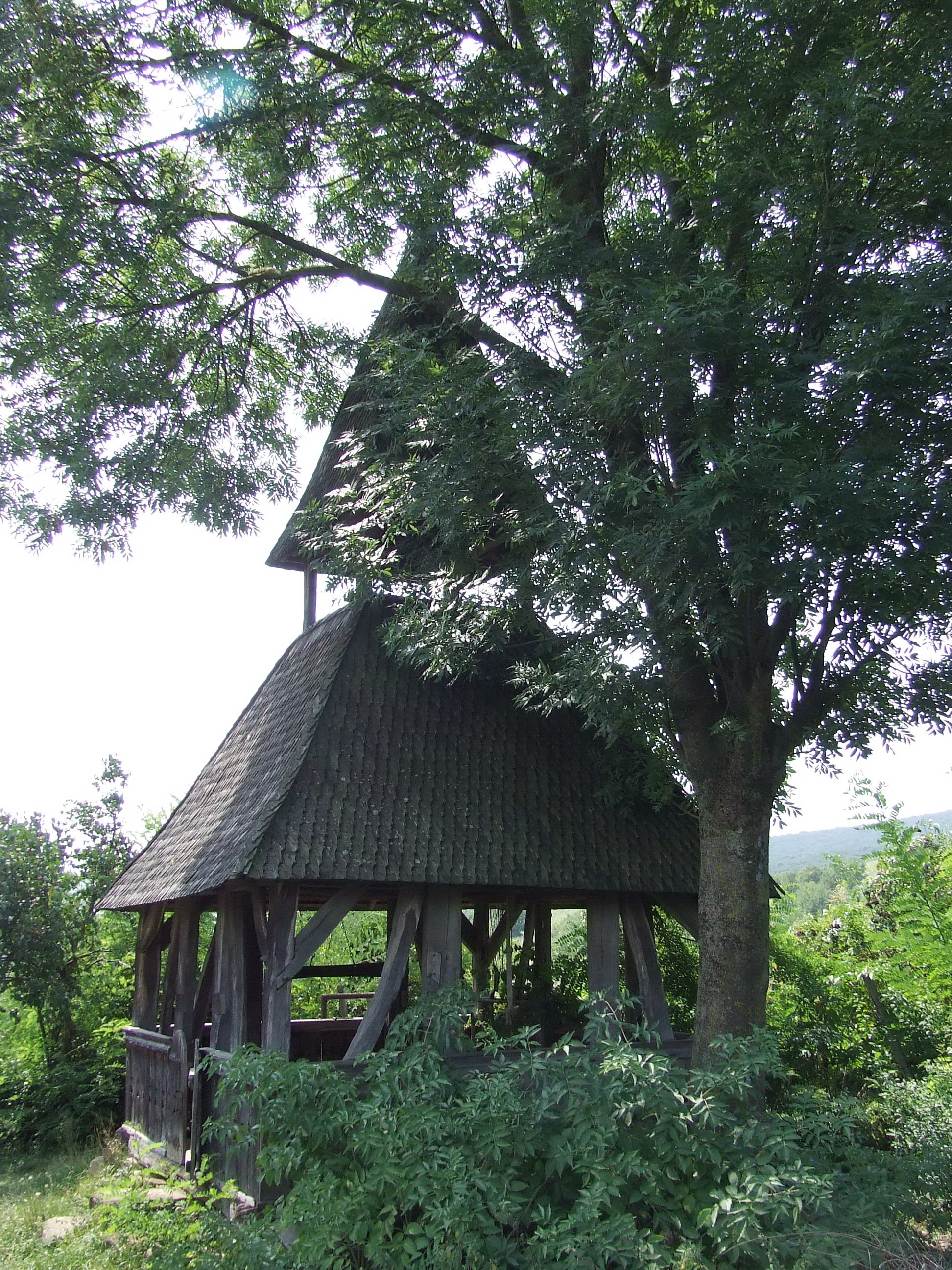 Biserica de lemn din Deag, cu hramul Buna Vestire, judeţul Mureş.